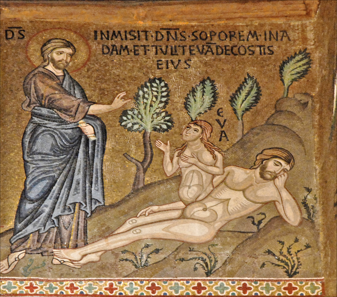 La création d'Ève L'intérieur de la chapelle est de style byzantin, il date de la fin de la décennie 1130, jusque dans les années 1150-1160 Au Xe siècle, la Sicile est rattachée au califat fatimide du Caire. L’île reste sous domination musulmane jusqu’à l’arrivée des Normands, qui, en 1059, obtiennent la souveraineté des mains de la Papauté décidée à rechristianiser des territoires que Byzance n’était plus capable de reconquérir. La conquête normande s’échelonne entre 1060 à 1090. Finalement, en 1130, Roger II (1130-1154) obtient la couronne de l’antipape Anaclet II (1130-1138) et rassemble les territoires normands en un royaume, choisissant naturellement Palerme comme capitale. Il y fait construire un palais et, dans celui-ci, un riche édifice cultuel, la Chapelle palatine, qui, par son architecture et son décor, demeure un exemple exceptionnel de métissage des arts chrétiens d’Orient et d’Occident, et d’art islamique. Article de Qantara sur la chapelle palatine Article de Wikipedia sur le palais des Rois Normands